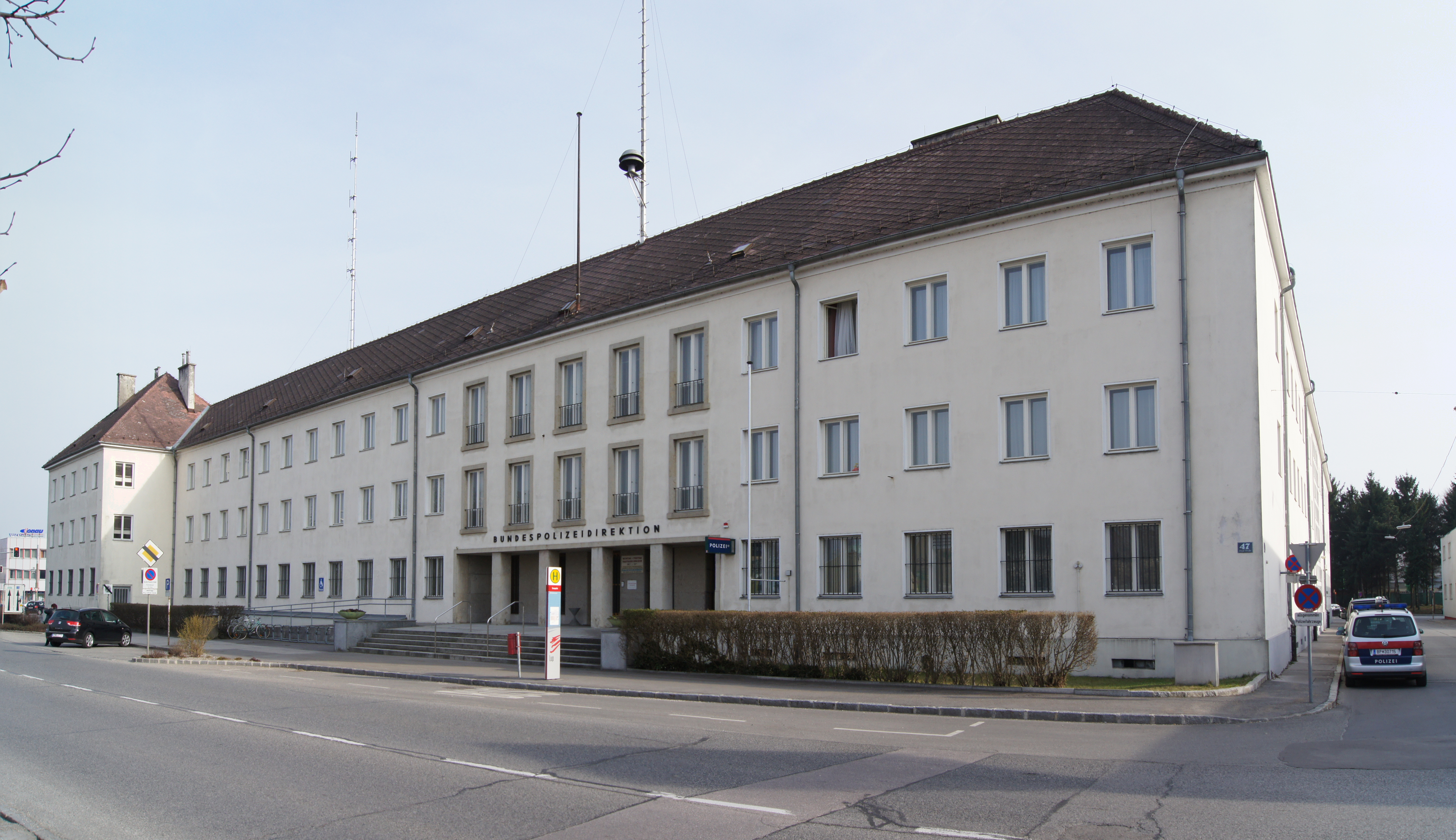 Die Polizeiinspektion St. Pölten - Linzer Straße